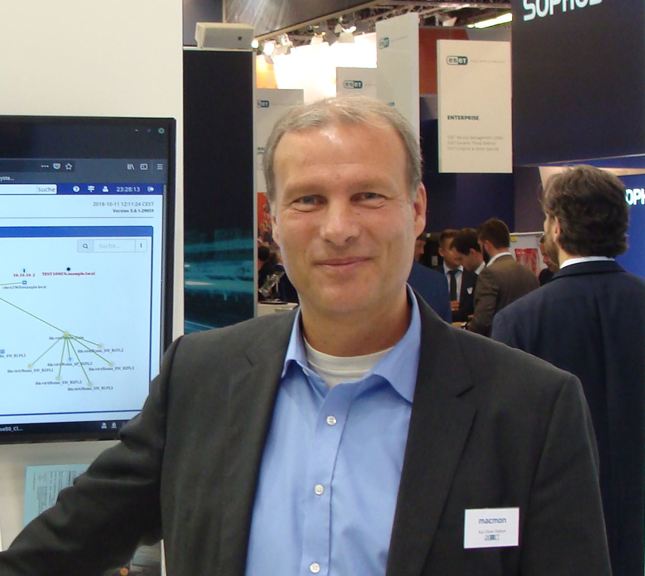 Kai-Oliver Detken auf einer Fachmesse im Jahr 2018